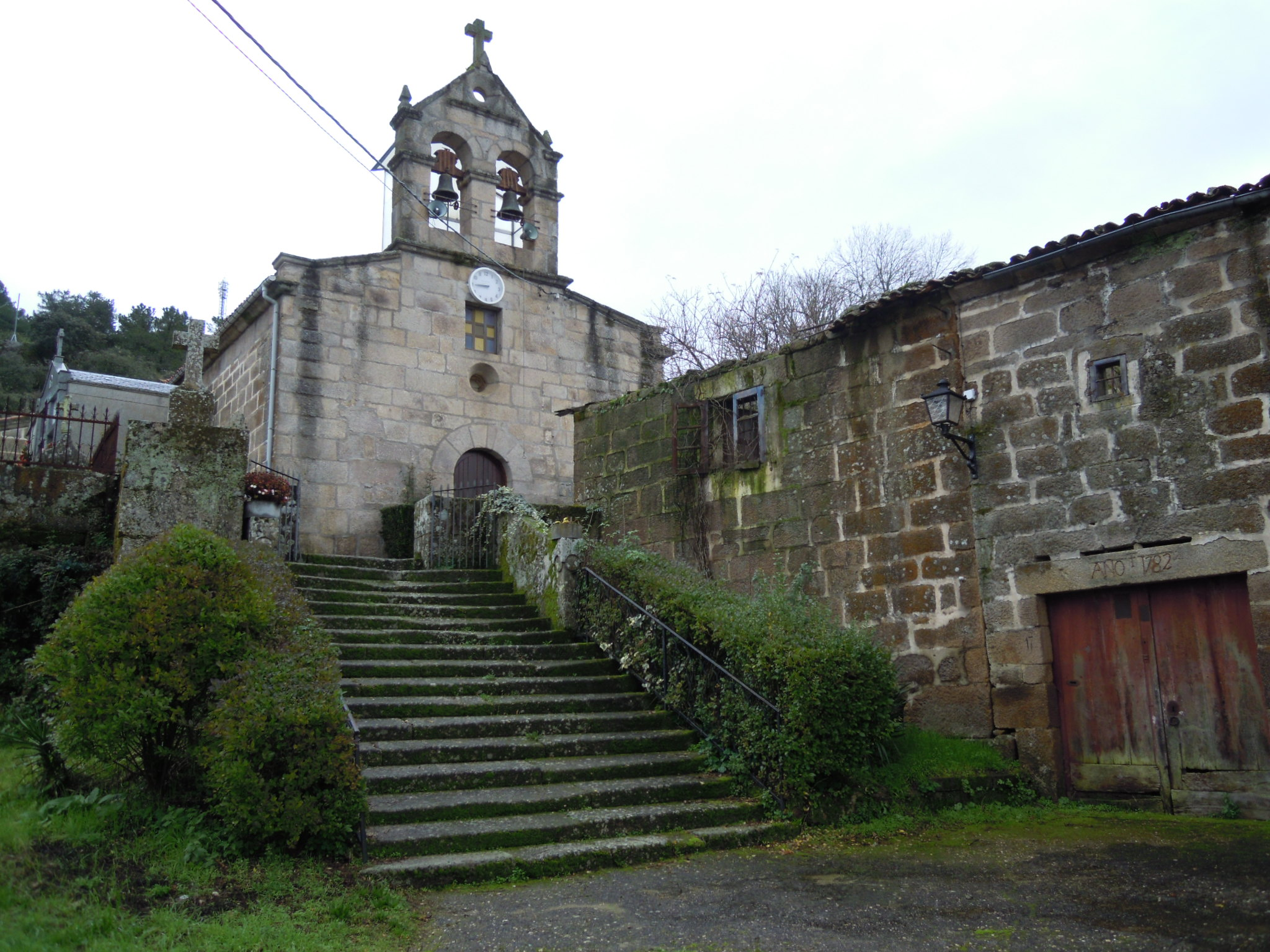 Igrexa parroquial de Cabreiroá (Verín), xunto a unha construción coa inscrición ANO 1782.